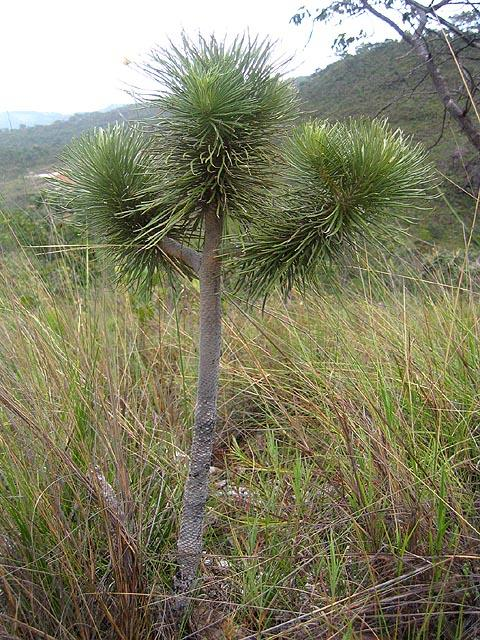 Arnica do campo (Lychnophora ericoides) em campo rupestre de Pirenópolis, Goiás, Brasil